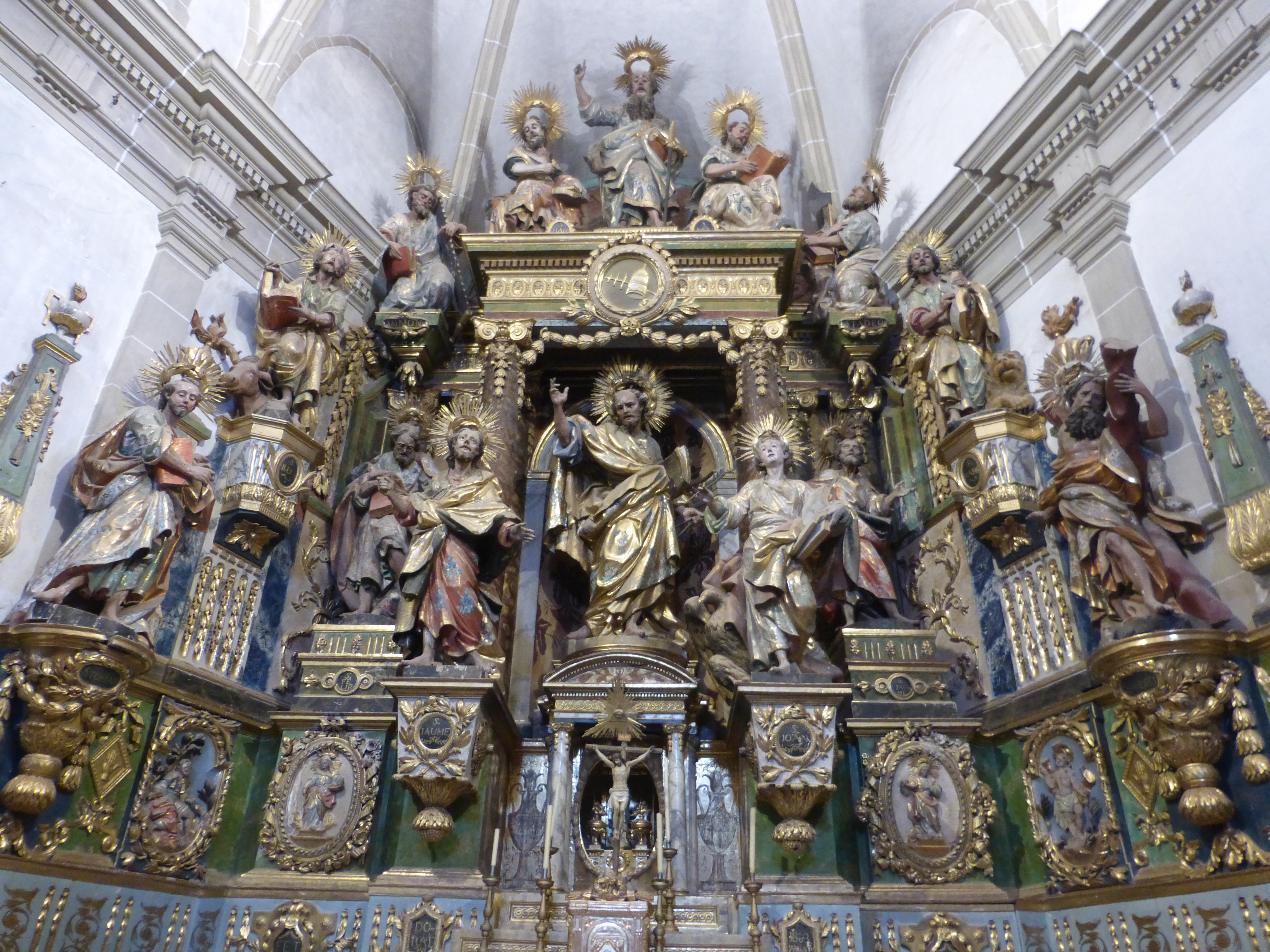 Altar major